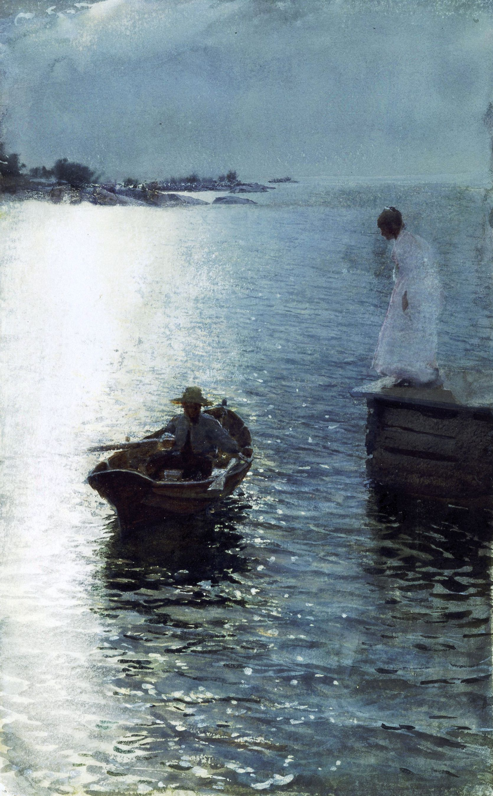 Sommervergnügen